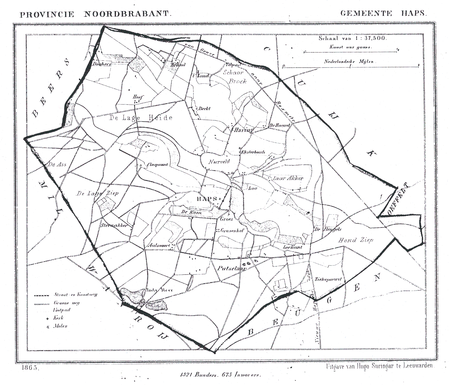 Nederland, Noord-Brabant, Gemeente Haps